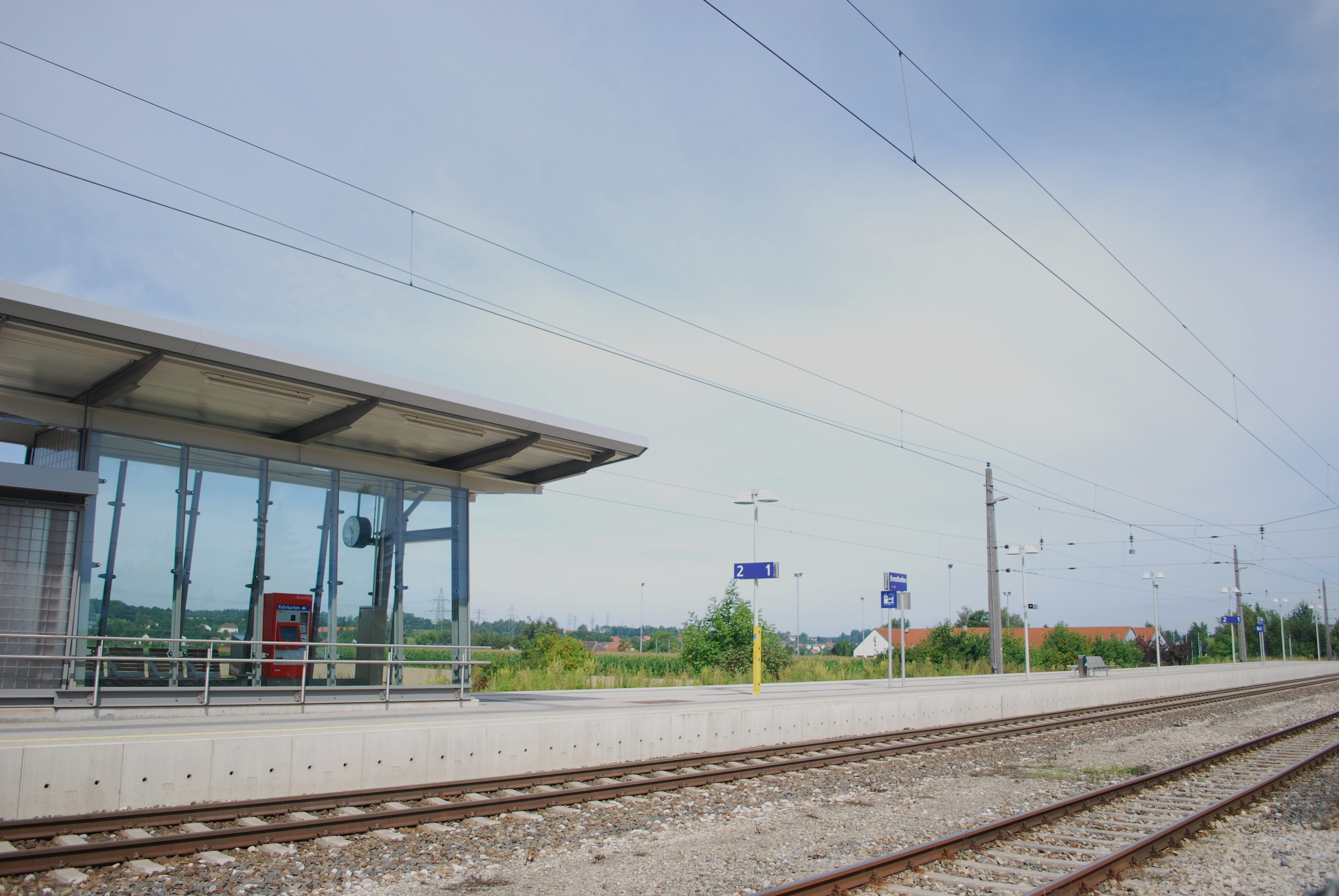 Bahnsteig Ernsthofen